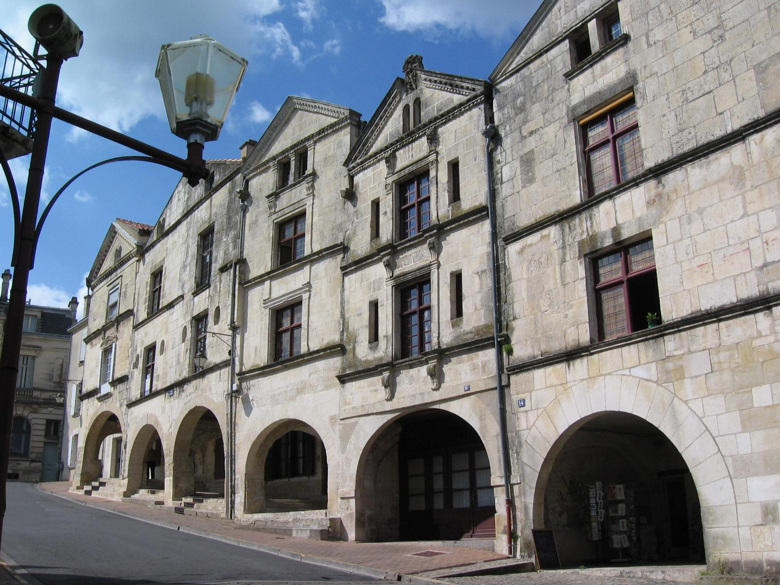 Old houses in Fontenay-le-Comte, Vendée